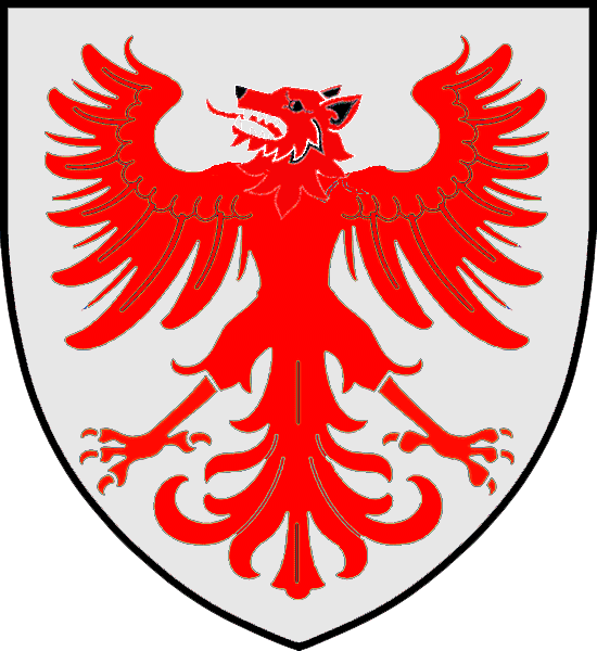 Vapensköld för svenska adelsätten Ulfeldt